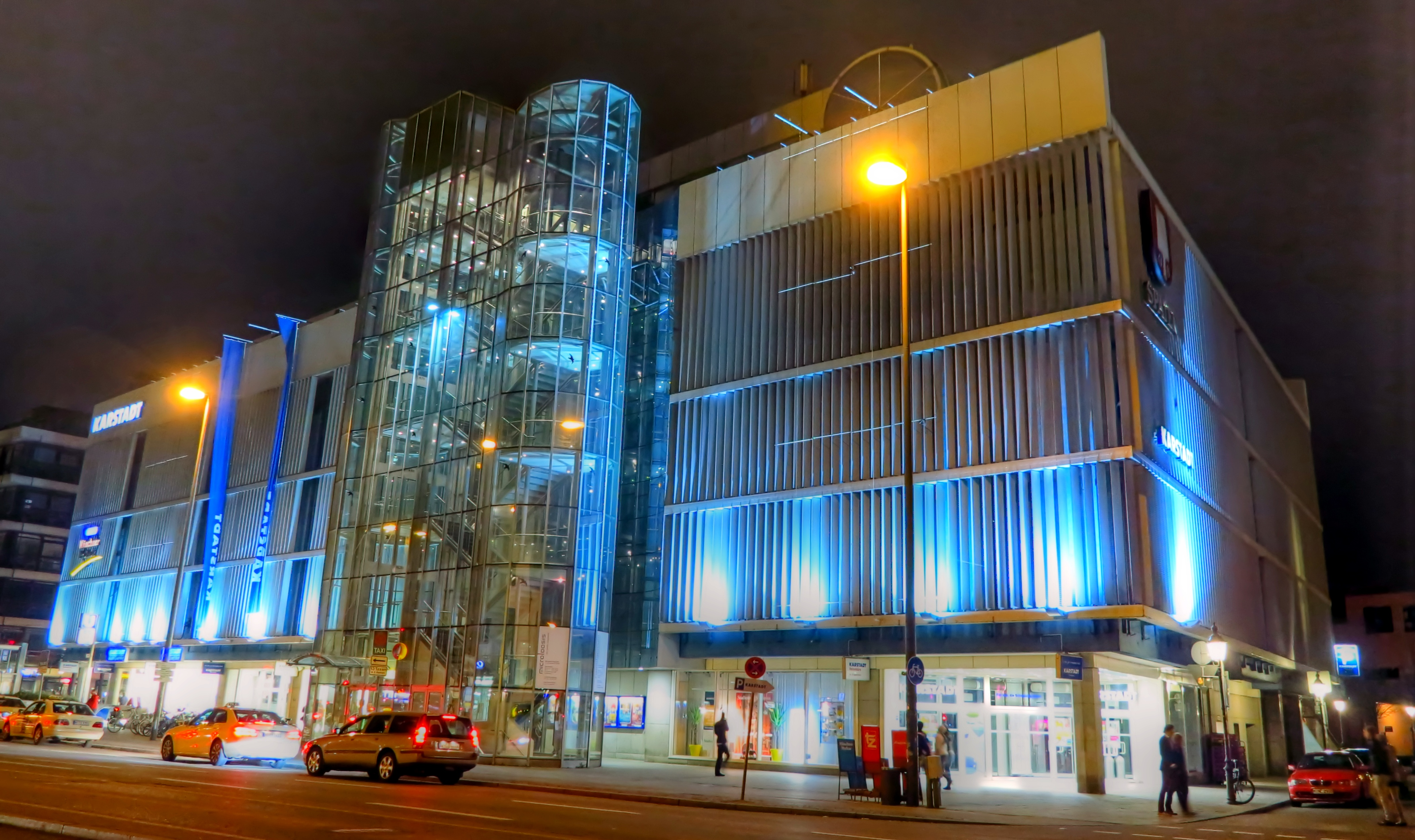 Deutschland, Bayern, München, Schwabing, Leopoldstraße, Kaufhaus (KARSTADT), Nacht-HDR-Aufnahme